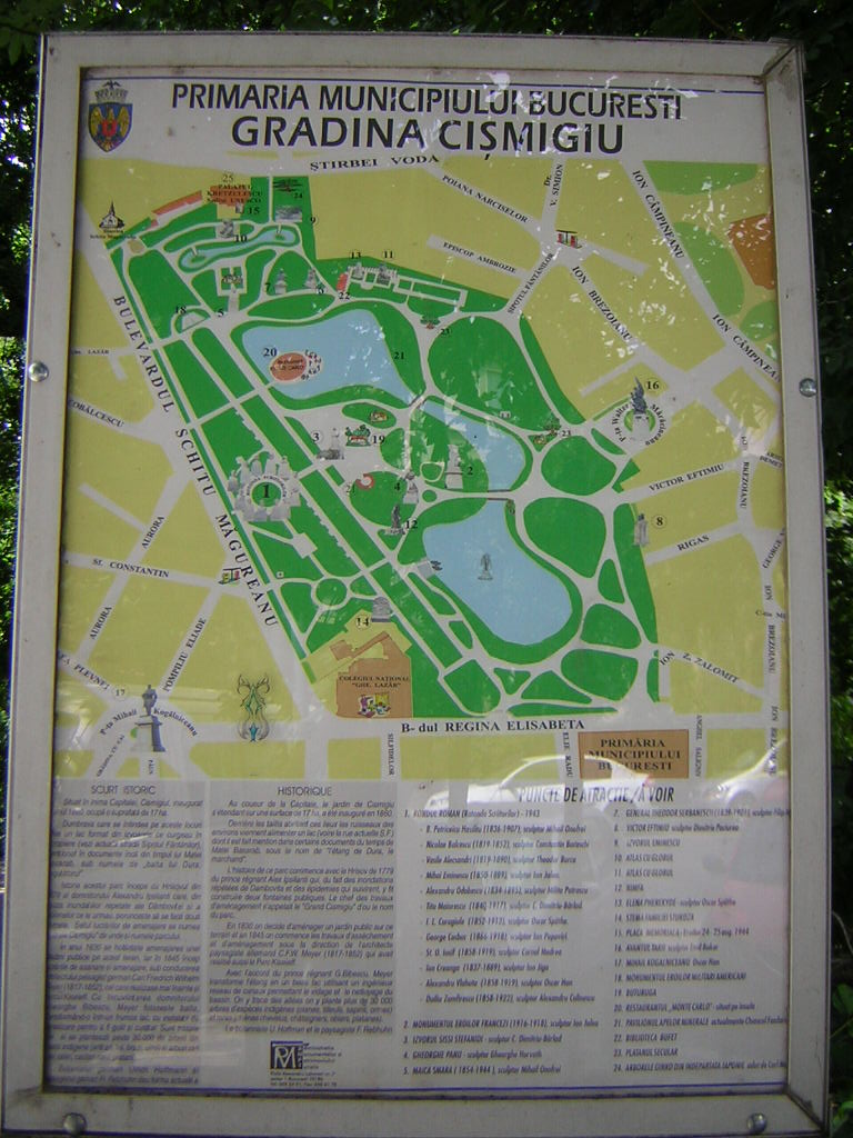 Cismigiu Garden in Summer